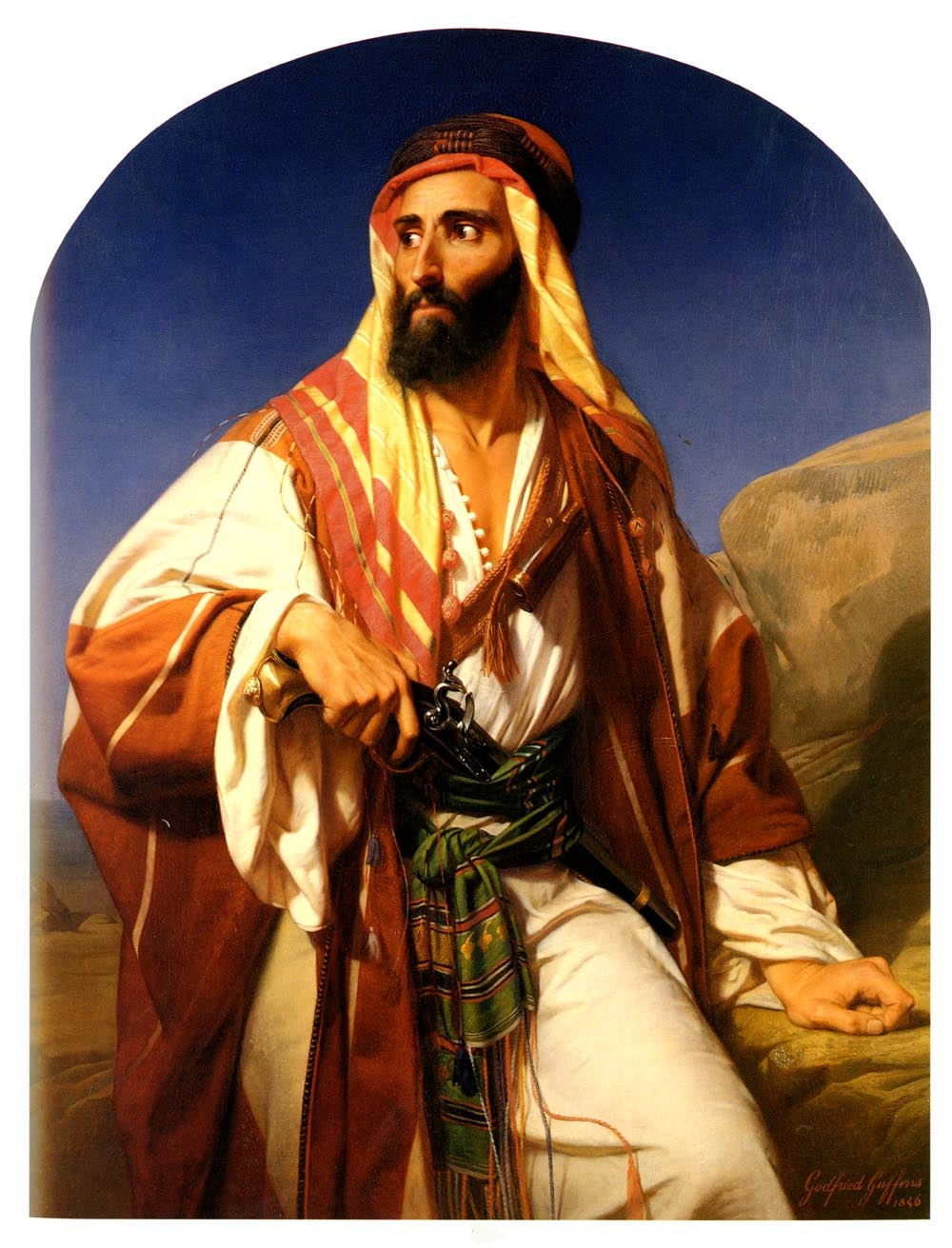 لوحة زيتيه رسمها الفنان جوفنز جودفرد للشيخ راشد ابوقبا عندما التقاه في شمال شبه الجزيره العربيه في القرن التاسع عشر Sheikh Rashid Abu-qaba; Arab oil painting made by Godfried Guffens when he met him in the North of the Arabian Peninsula in the Nineteenth Century. (There's no evidence Guffens ever travelled to the Middle East. It was probably done in Italy with a model.)